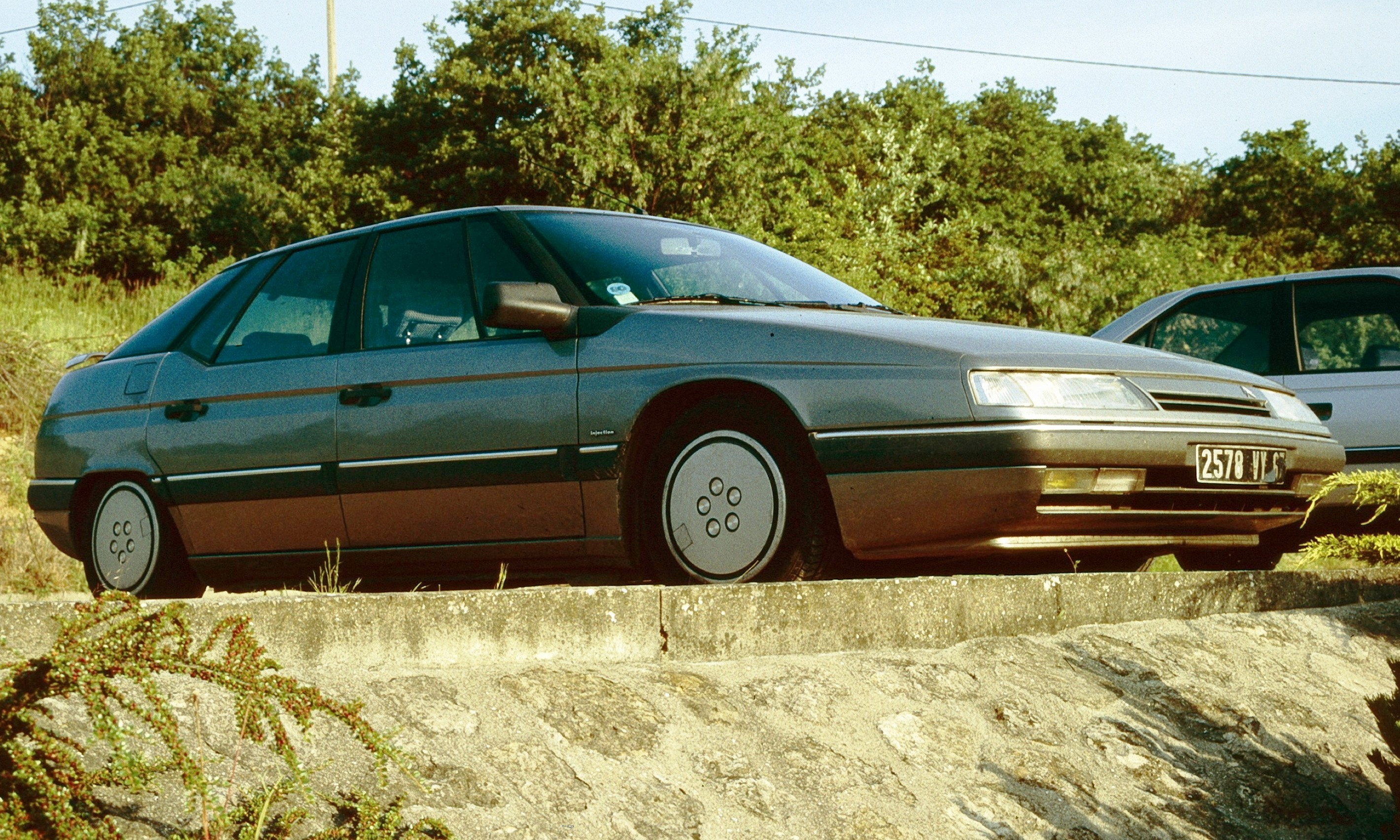 Citroen XM